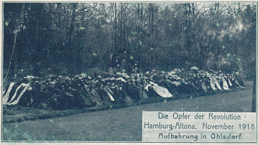 Kränze und Blumengebinde mit Schleifen liegen auf einem Hügel, der sich in der Mitte durch das Bild zieht. Im Hintergrund stehen blattlose Bäume. Am rechten unteren Rand der Postkarte befindet sich die Aufschrift: Die Opfer der Revolution Hamburg-Altona, November 1918 Aufbahrung in Ohlsdorf.